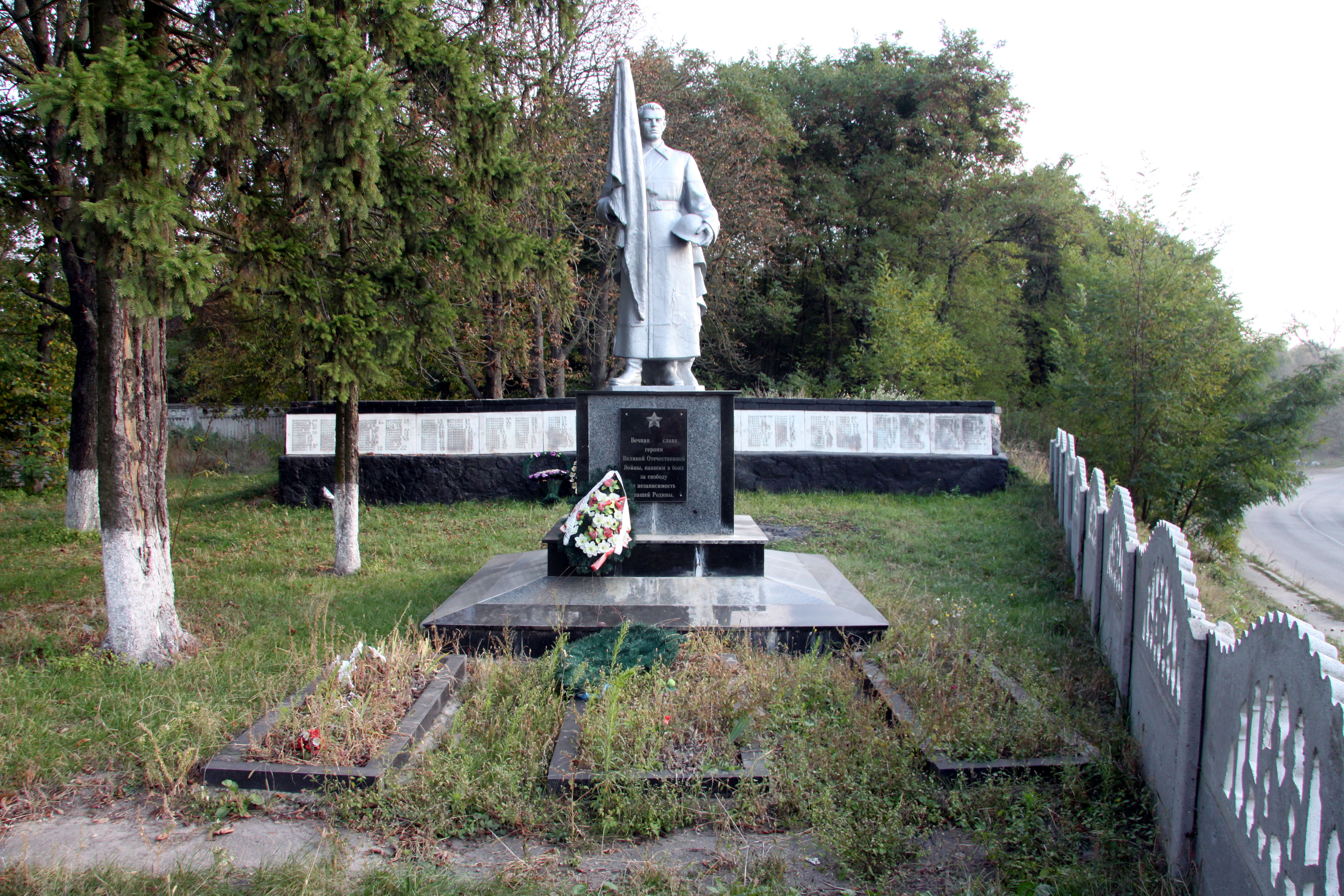 Пам'ятник воїнам-визволителям та воїнам-односельчанам, центр села, село Червона Мотовилівка